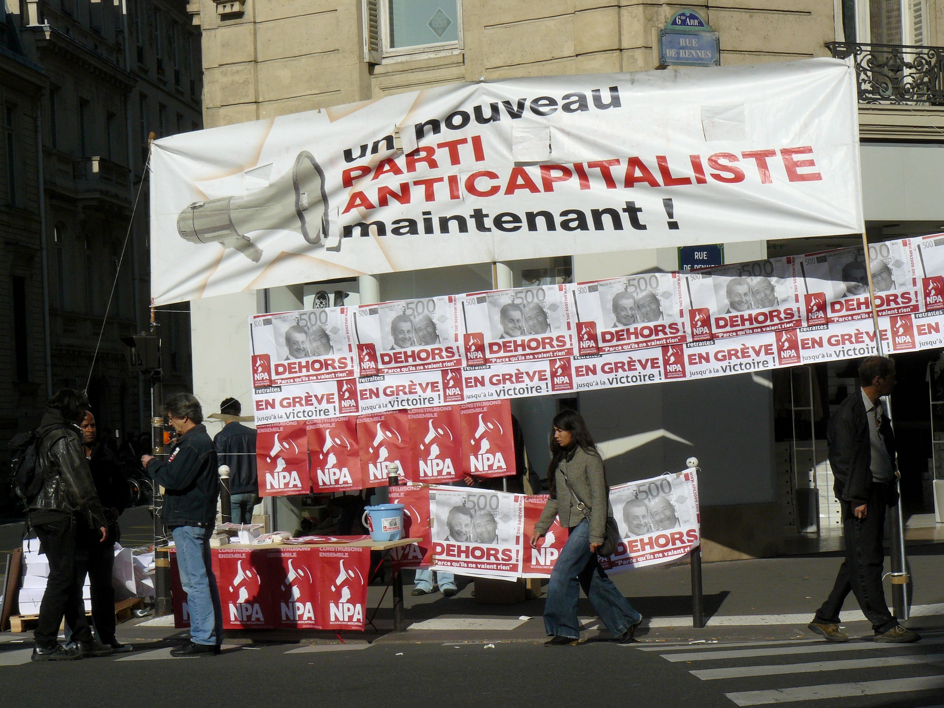 Point fixe du NPA sur la rue de Rennes (6e arrond. de Paris), le 12 octobre 2010 lors de la manifestation contre la réforme des retraites.